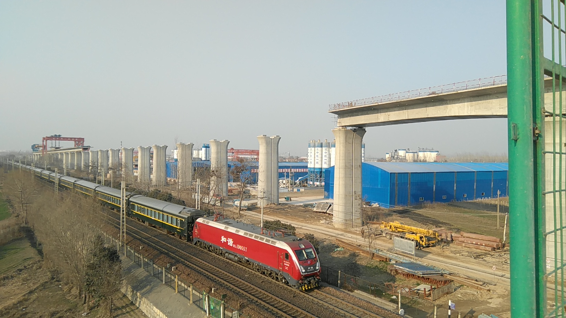 建设中的商杭客运专线上跨国道 G105，并行的京九线下穿国道 G105 背景为商合杭铁路河南段商丘制梁场